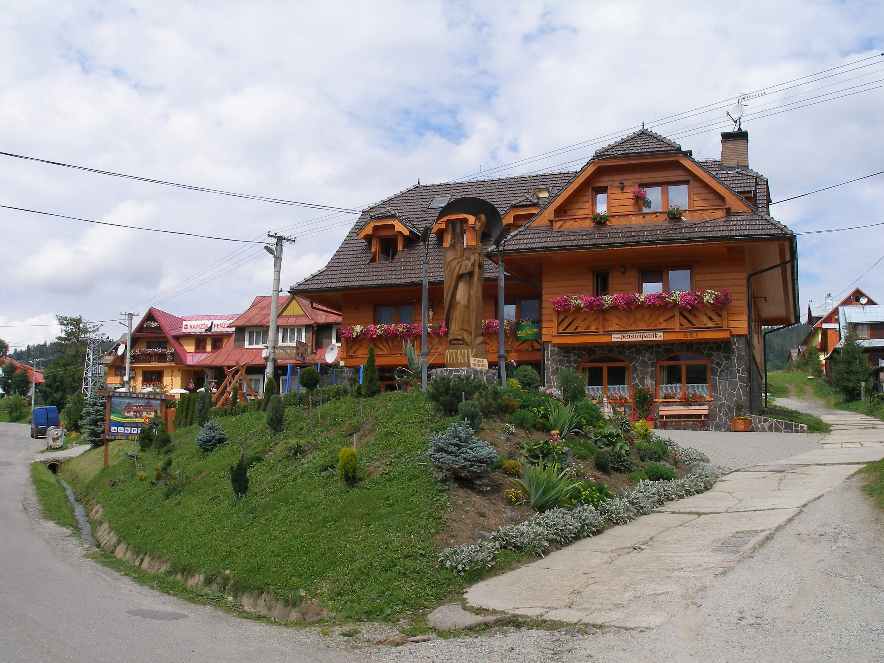 Podtatranská obec Ždiar.